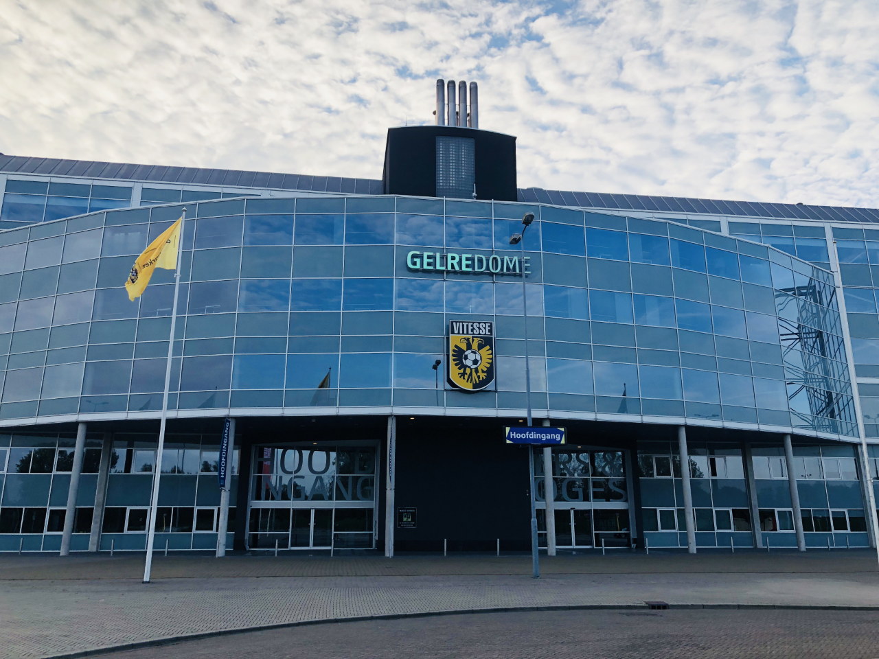 Hoofdingang stadion GelreDome Arnhem